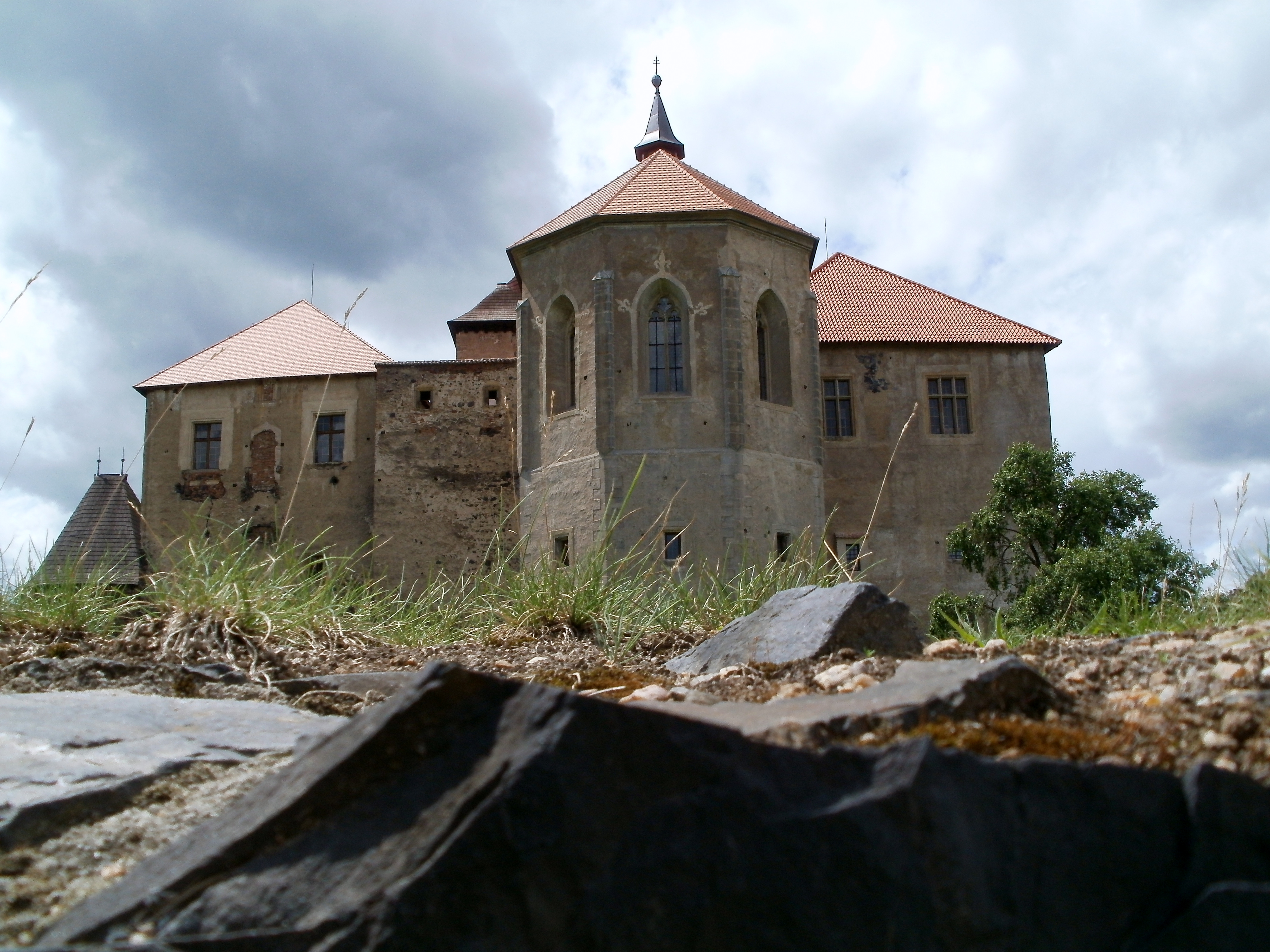 Hrad Švihov (Švihov)